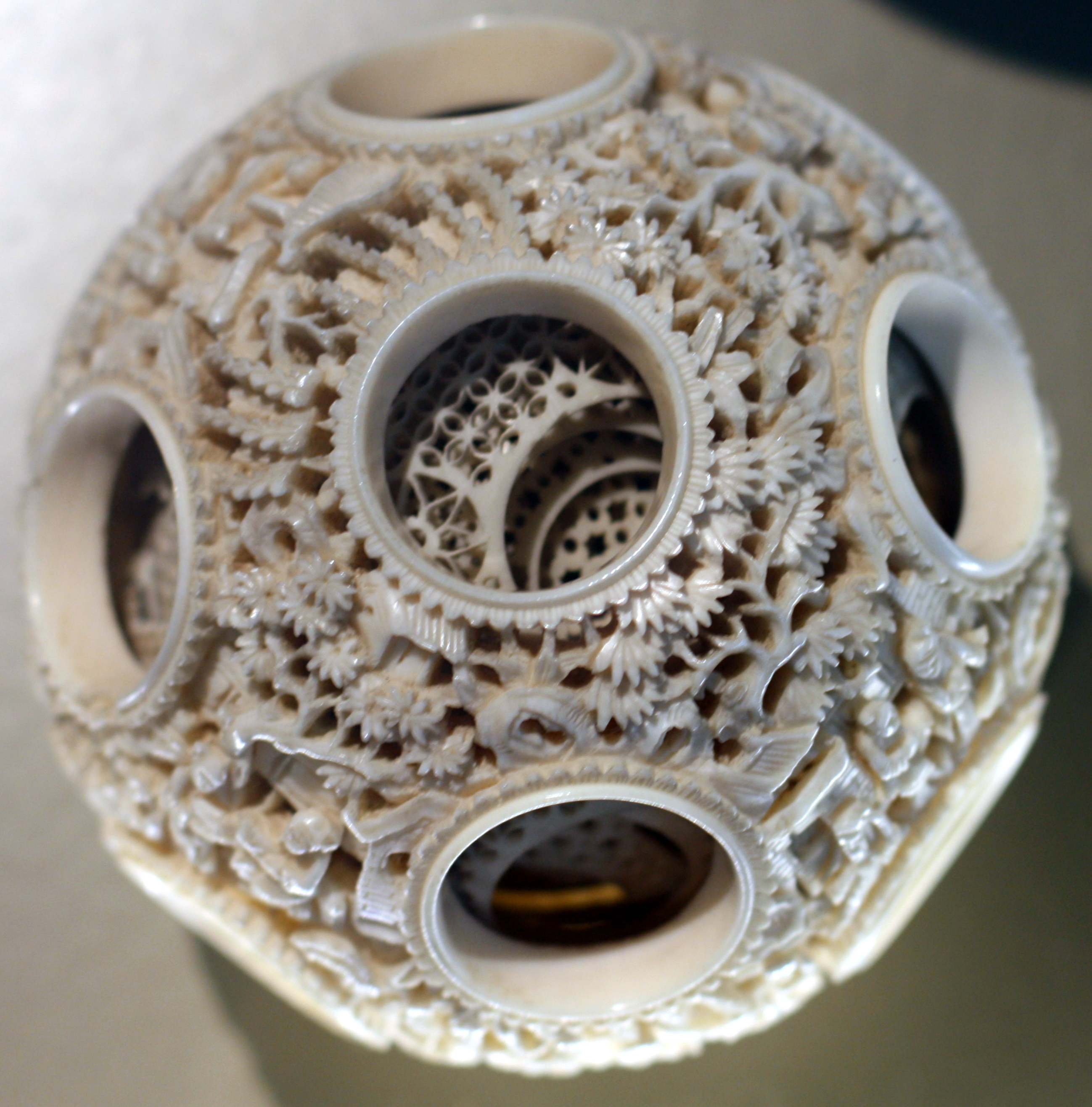 Elfenbeinschnitzerei im Überseemuseum Bremen